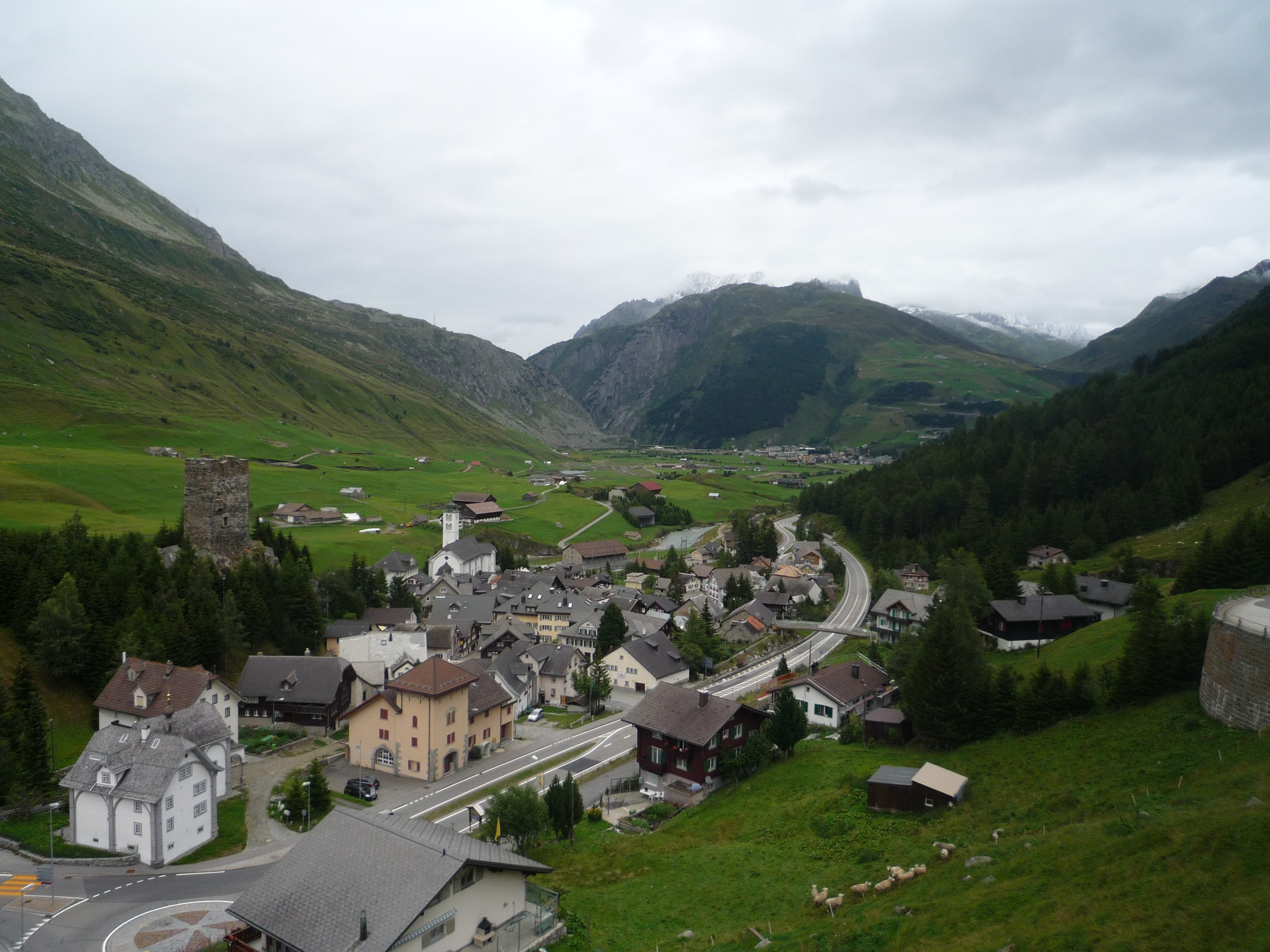 20100816 077 Hospental